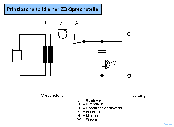 Prinzipschaltung des Zentralbatteriebetriebs